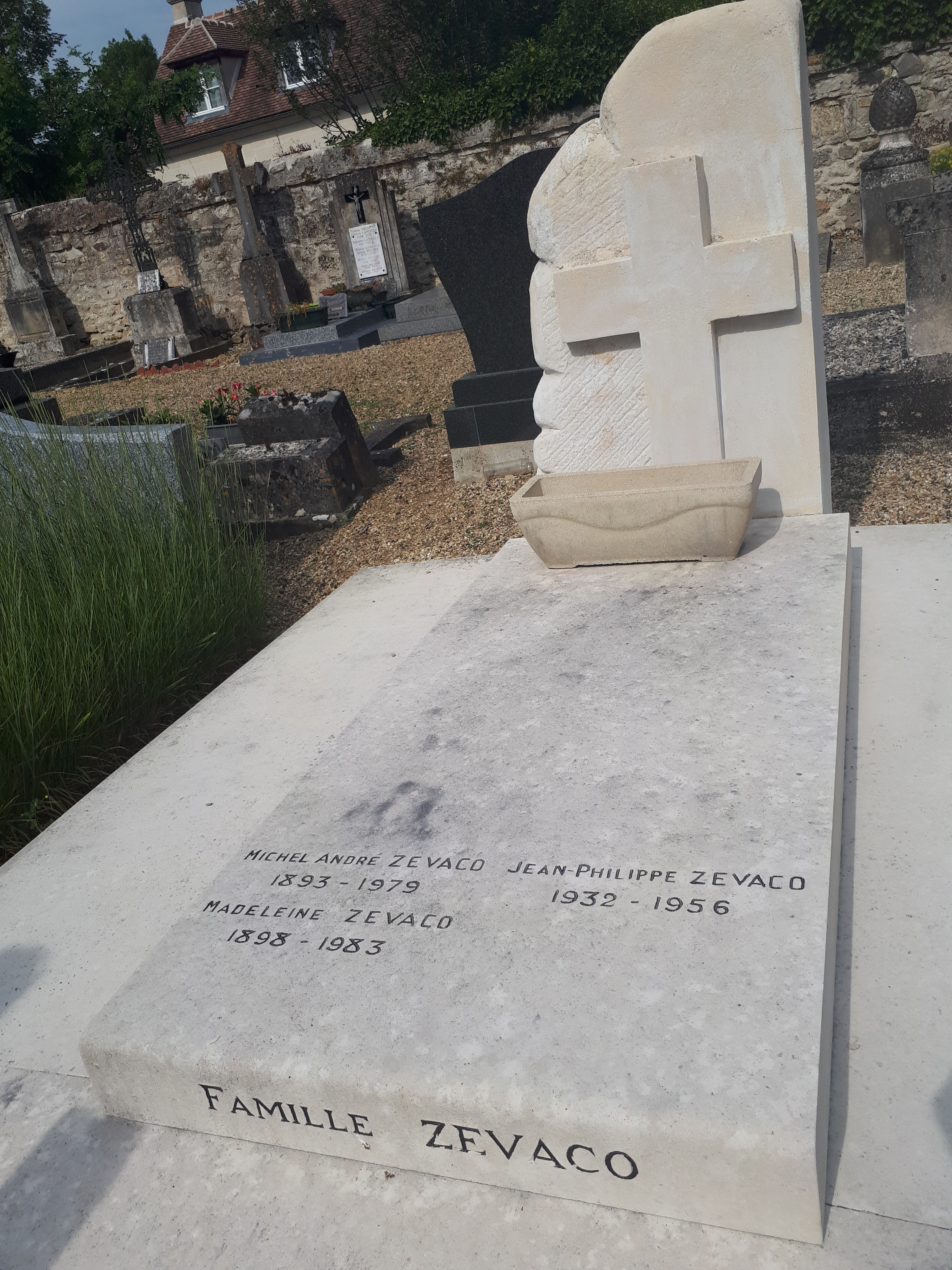 Tombe de Michel André Zévaco, de sa femme et de leur fils à Saint-Jean-aux-Bois (Oise)